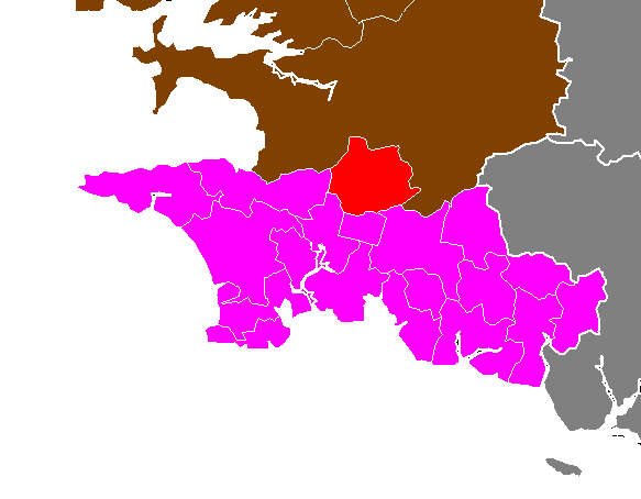 Maps of arrondissements and cantons of France: Arrondissement de Quimper - Canton de Briec.PNG (Département du Finistère , Arrondissement de Quimper)